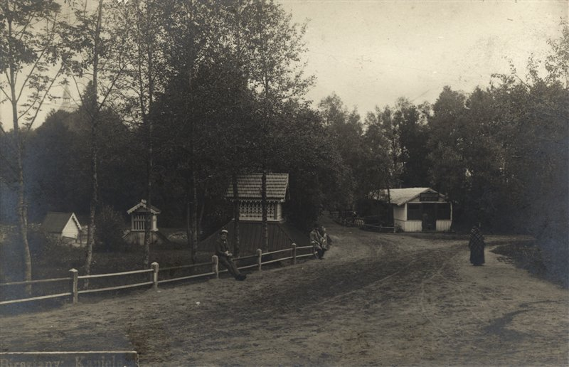 Gydomieji šaltiniai Birštone. XX a. pr.